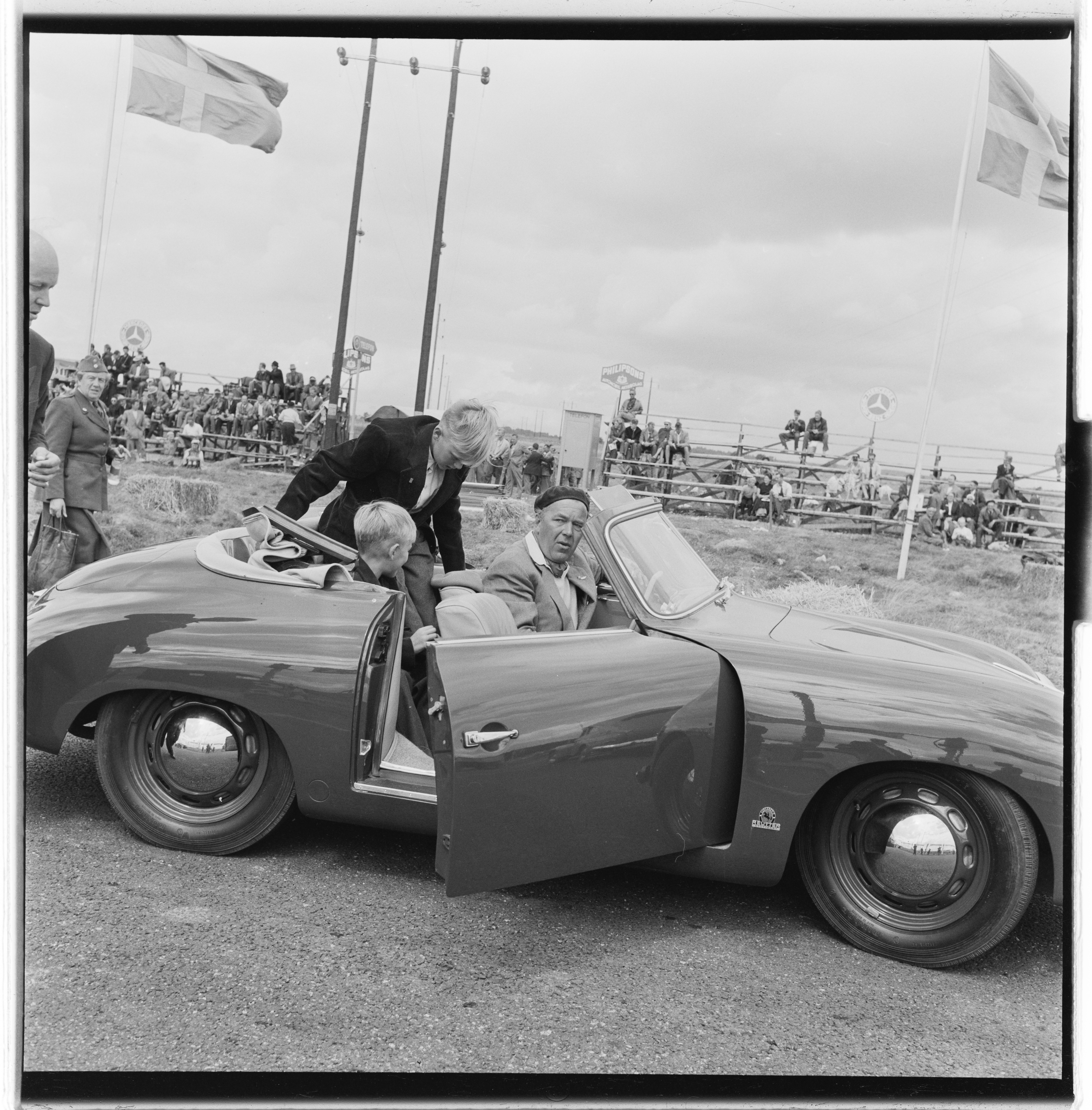 Bildet er hentet fra Arkivverket. Grand Prix i Kristianstad. NÅ nr. 33, 1955 Arkivinstitusjon : Riksarkivet Arkivnavn : Billedbladet NÅ Sted : Sverige, Skåne, Kristianstad, Råbelövsbanan Emneord: billøp, racing, motorsport Avbildet